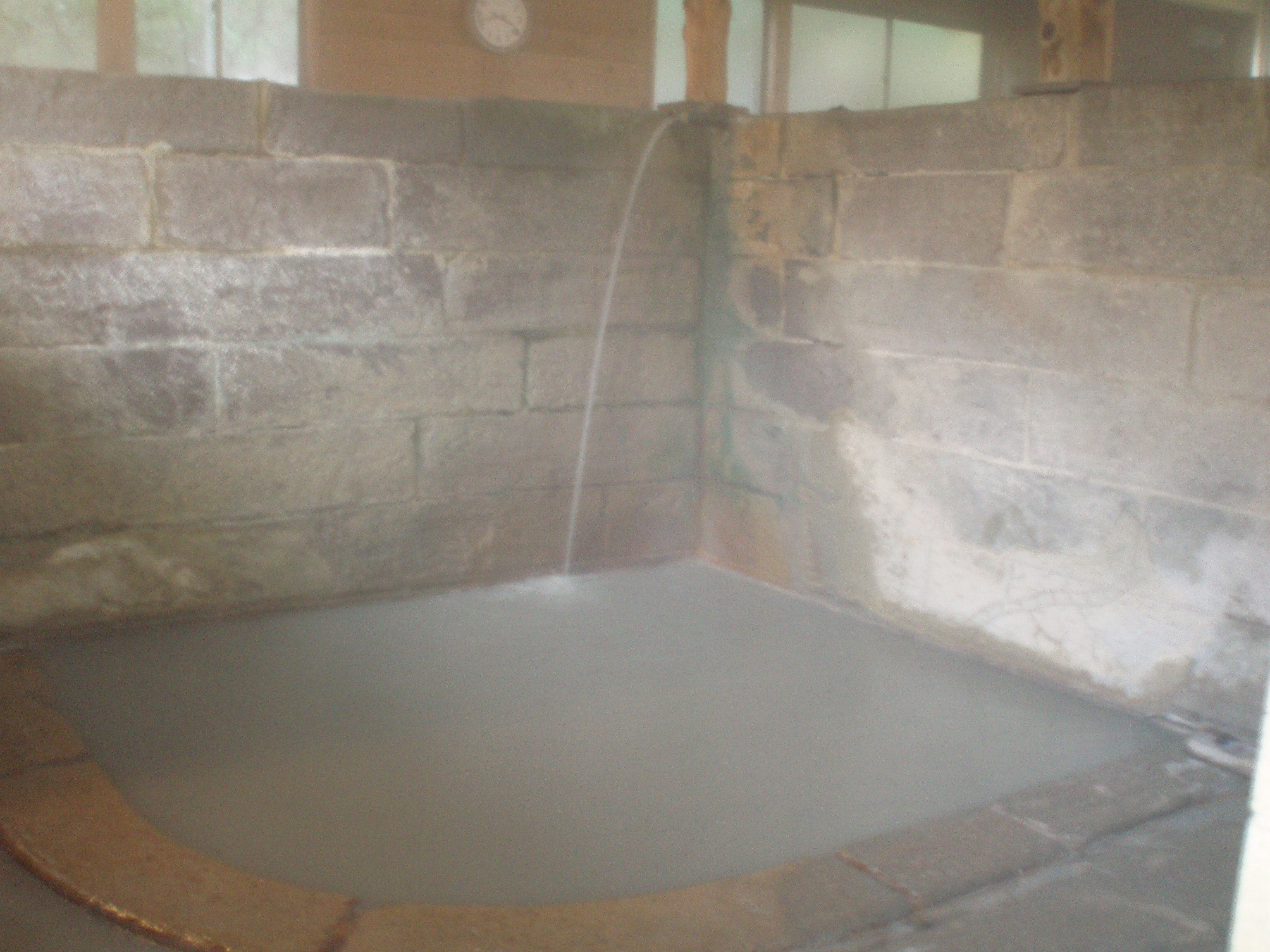 鹿児島県湧水町、栗野岳温泉、南洲館、竹の湯